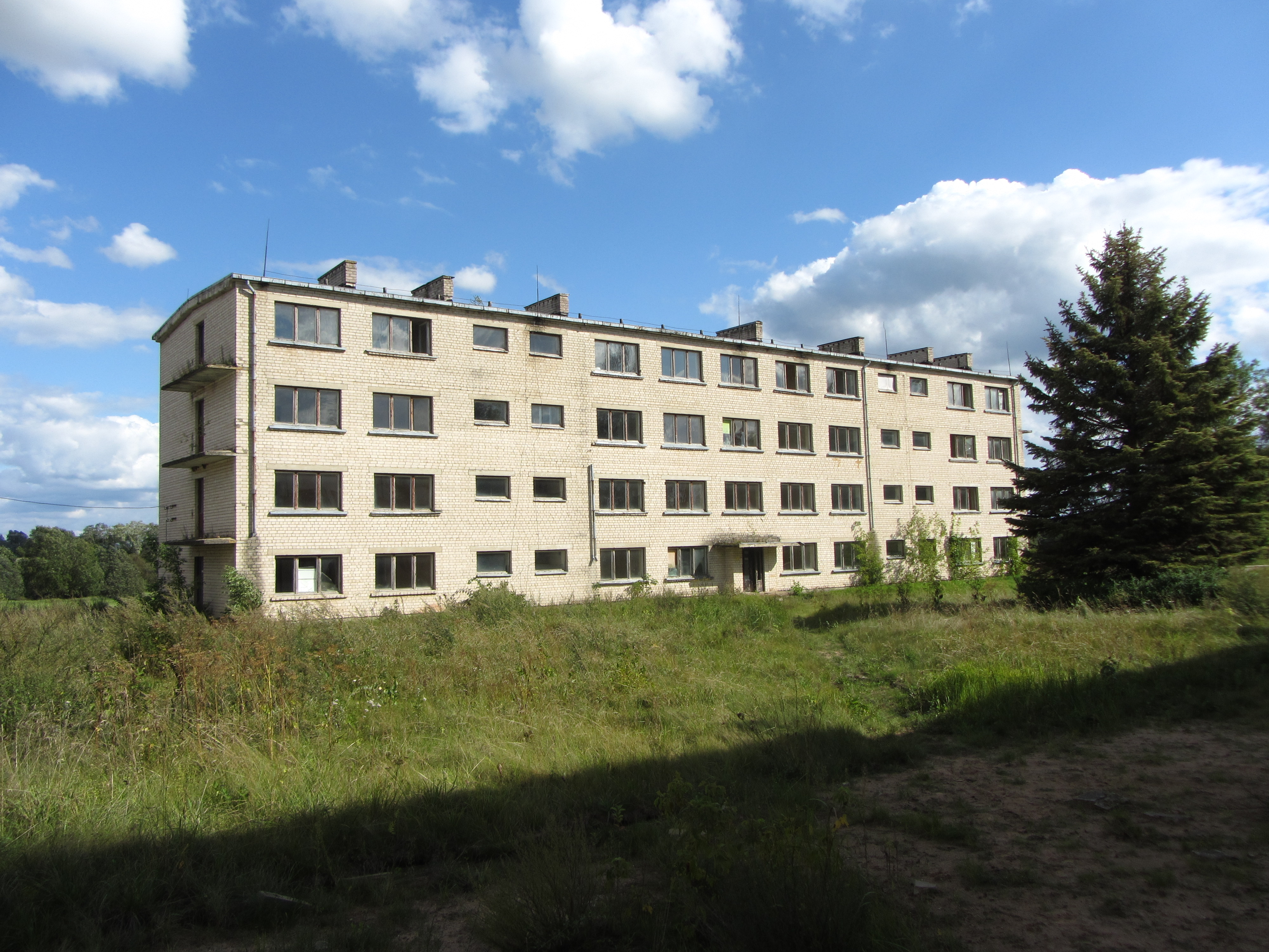 Konstantinava